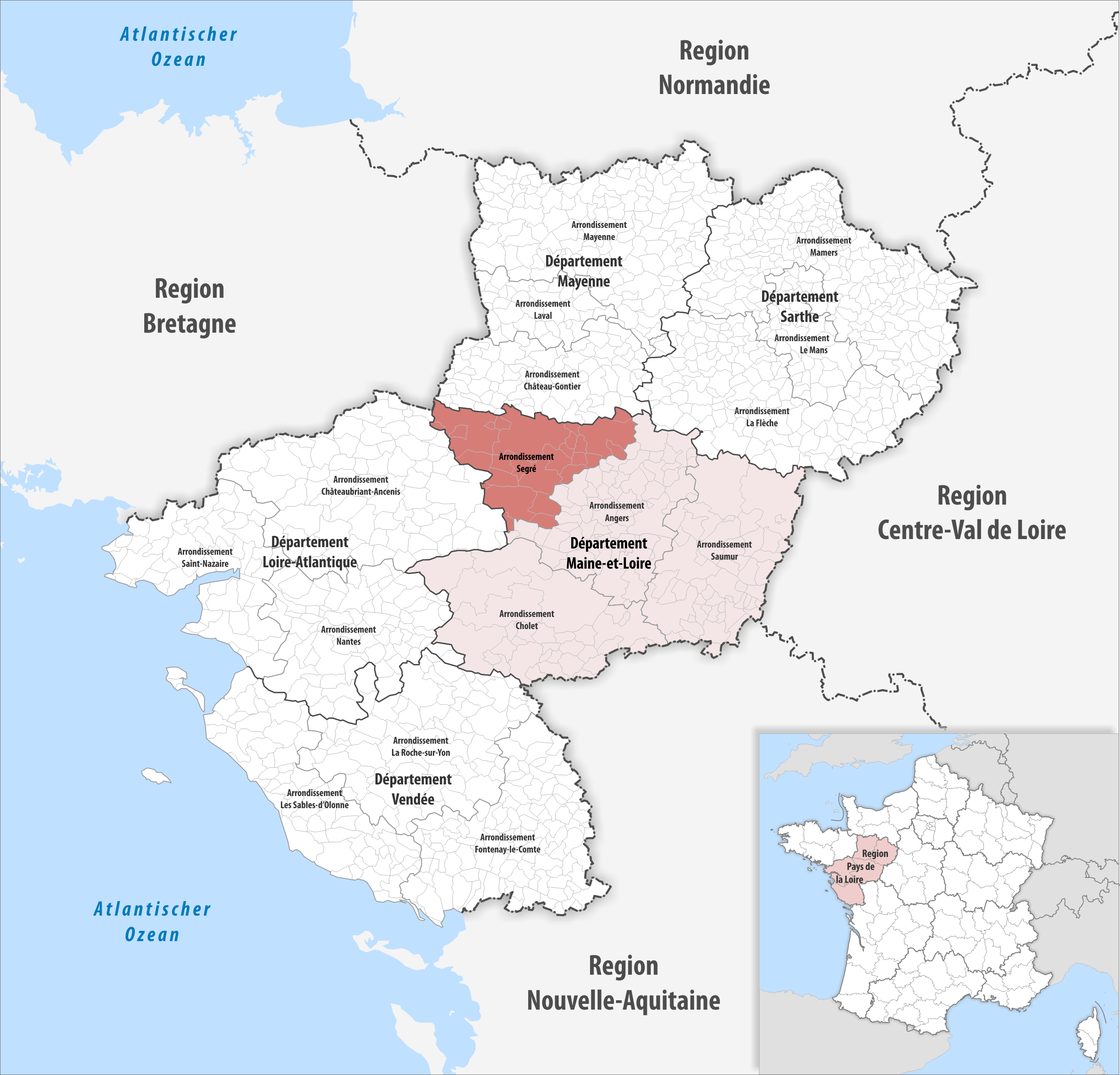 Lage des Arrondissements Segré